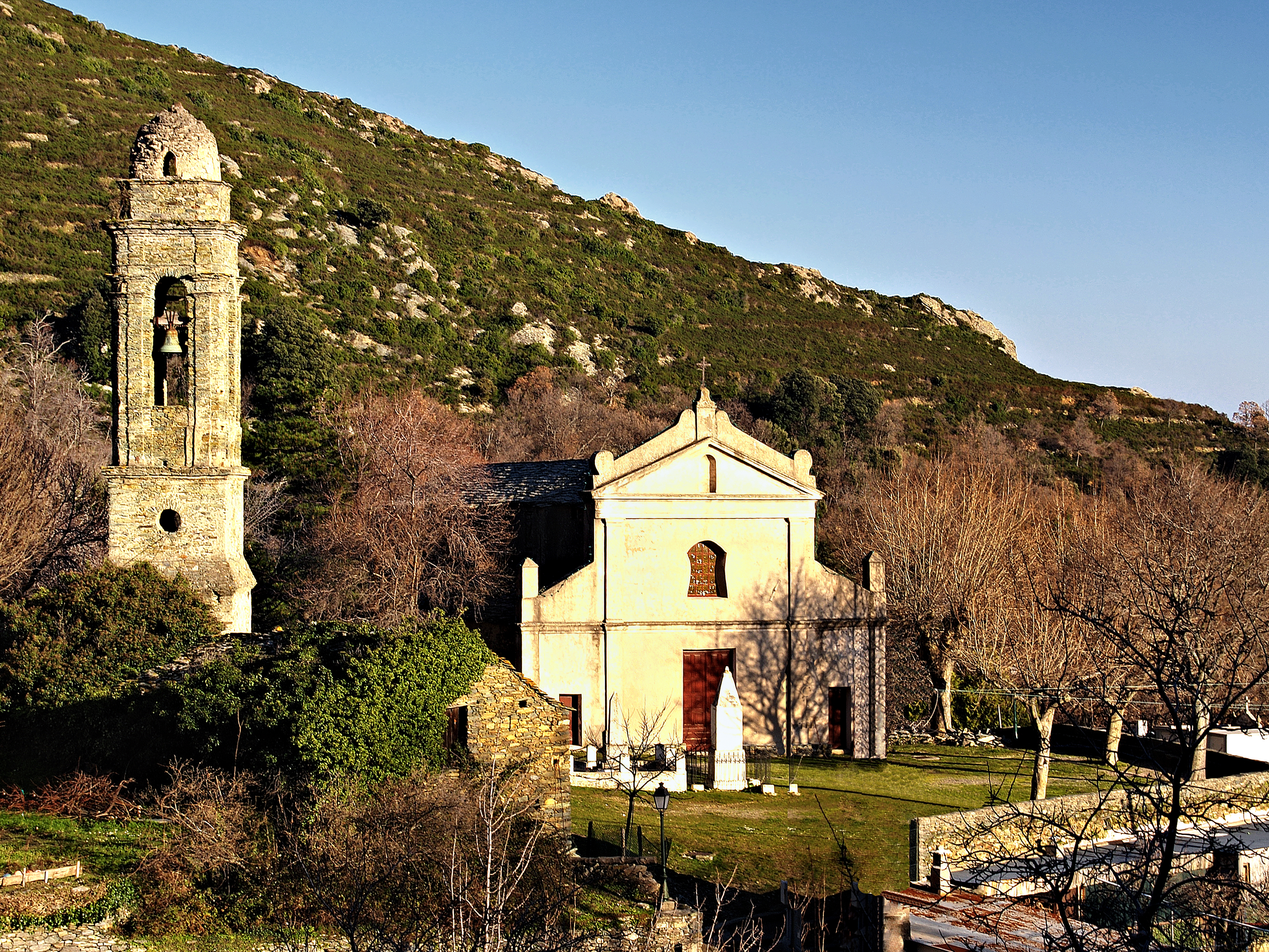 Scolca (Corse) - Eglise San Mamilianu